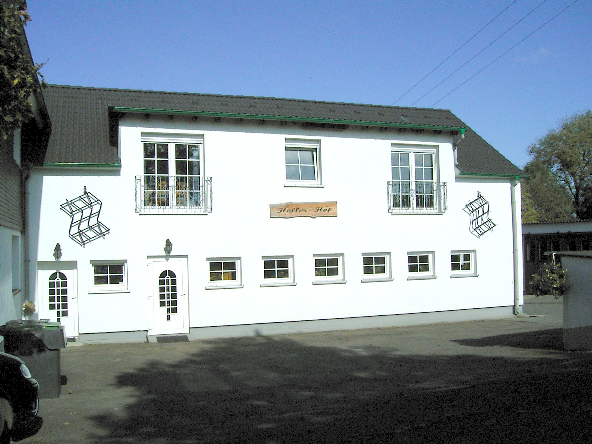 Radevormwald